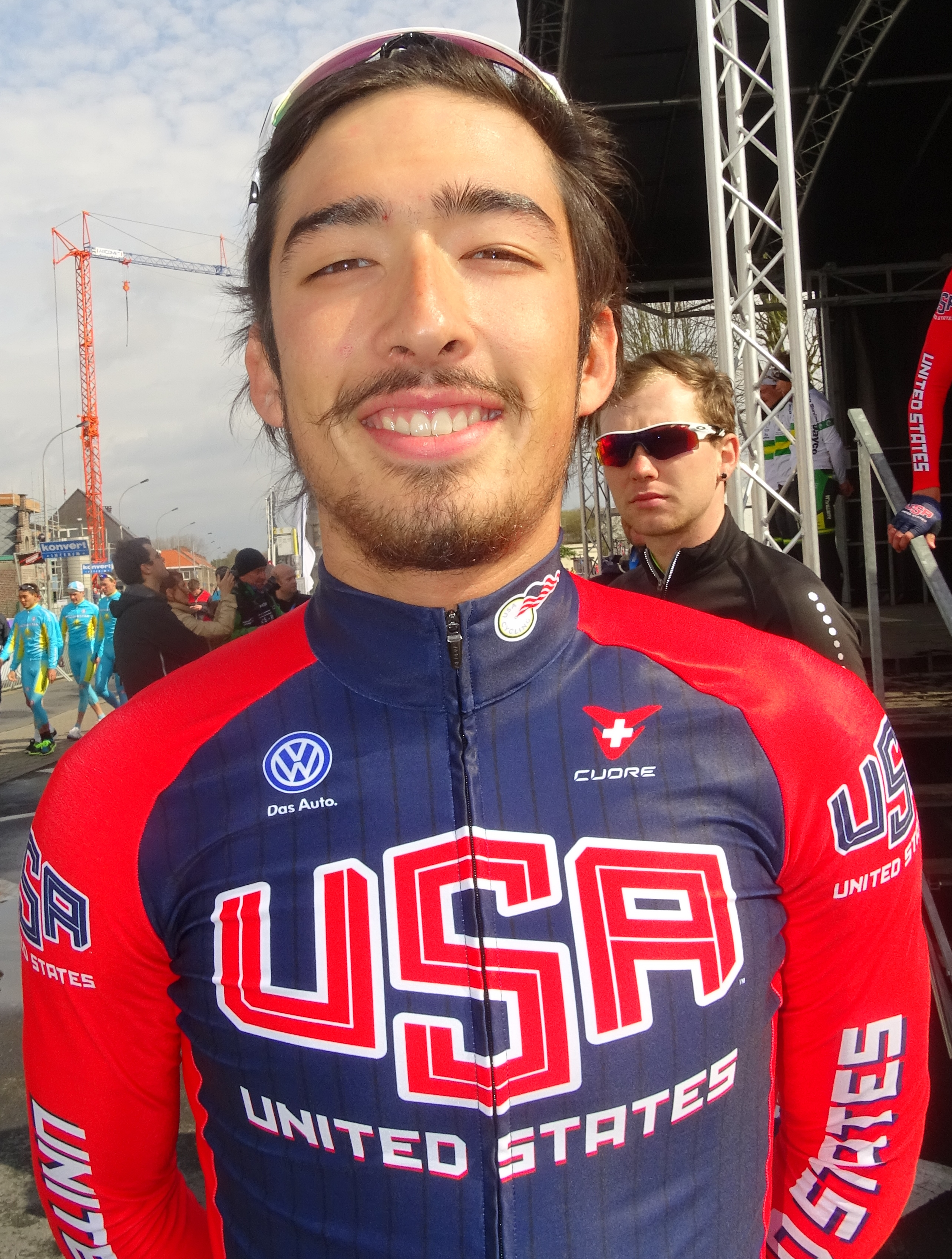 Reportage réalisé le samedi 11 avril à l'occasion du départ et de l'arrivée du Tour des Flandres espoirs 2015 à Audenarde, Belgique.